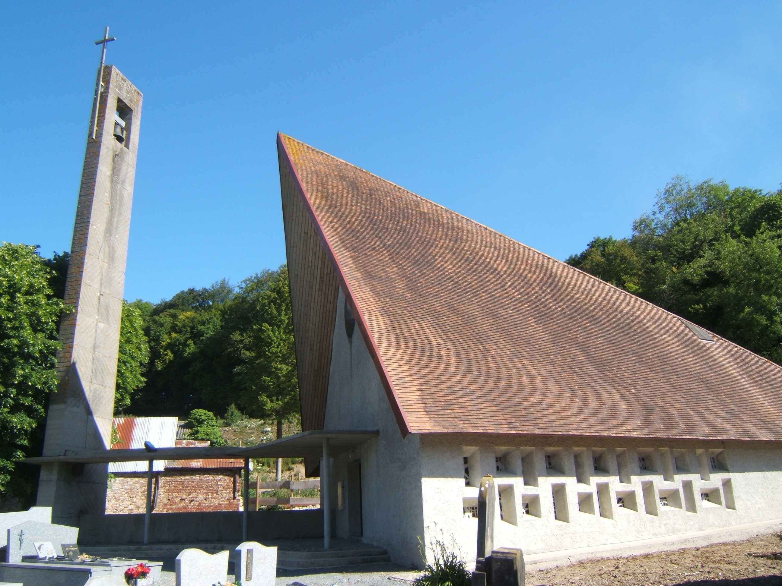 Eglise de Blangerval-Blangermont